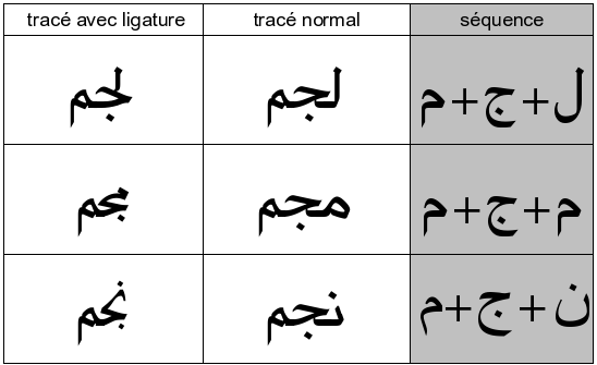 Copie d'écran d'un travail personnel publié pour Wikipédia sous licence GFDL. Vincent Ramos